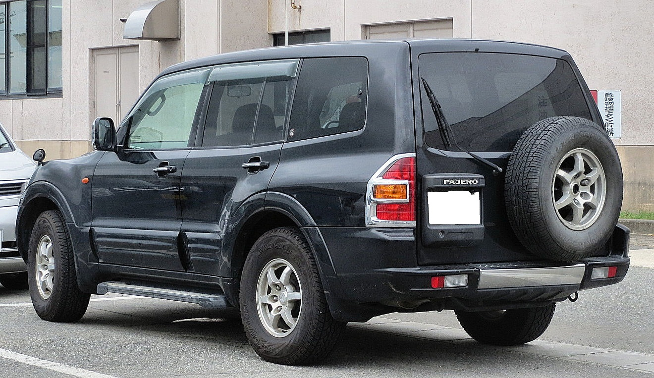 三菱 パジェロ ロング EXCEED-S